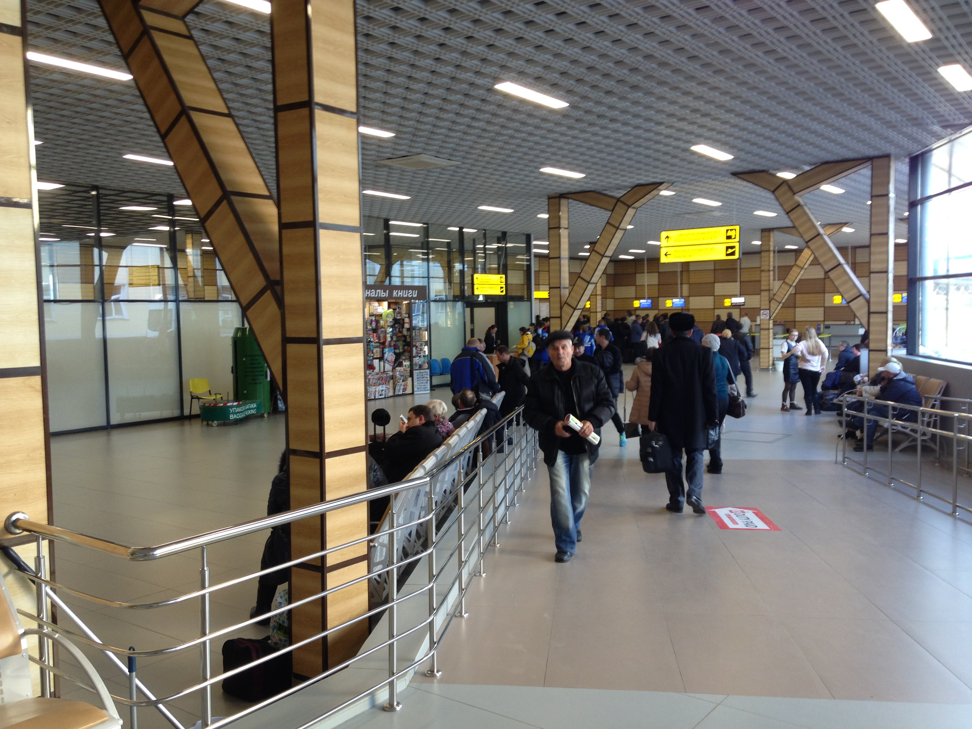 Терминал В аэропорта Симферополя в декабре 2015